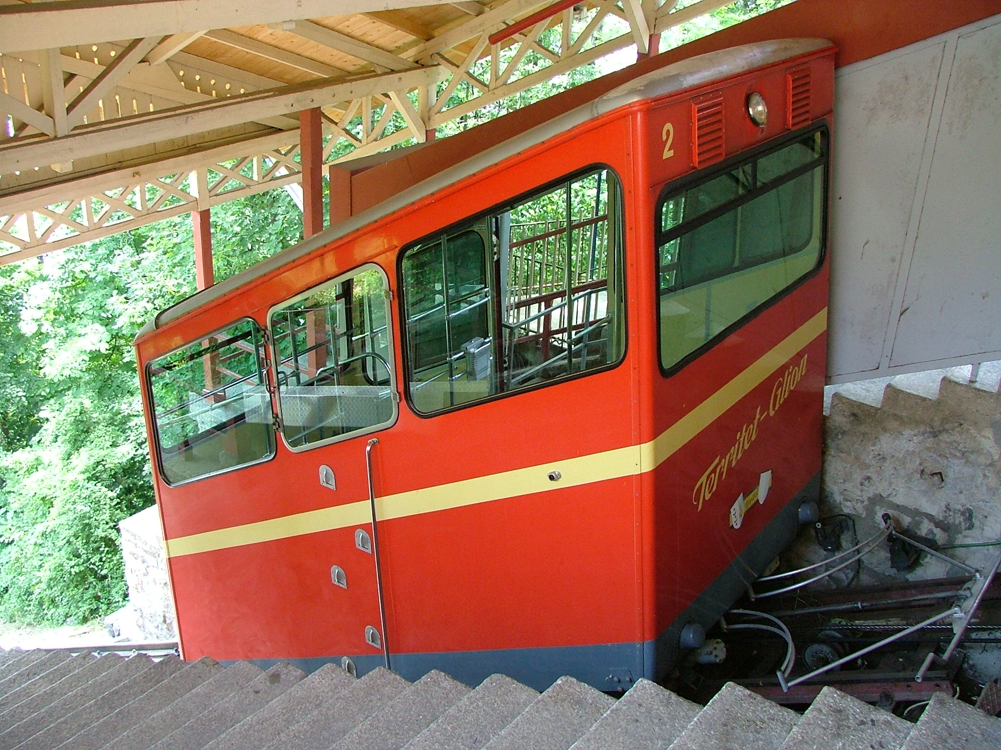 Kolej Territet-Glion w 2006r.